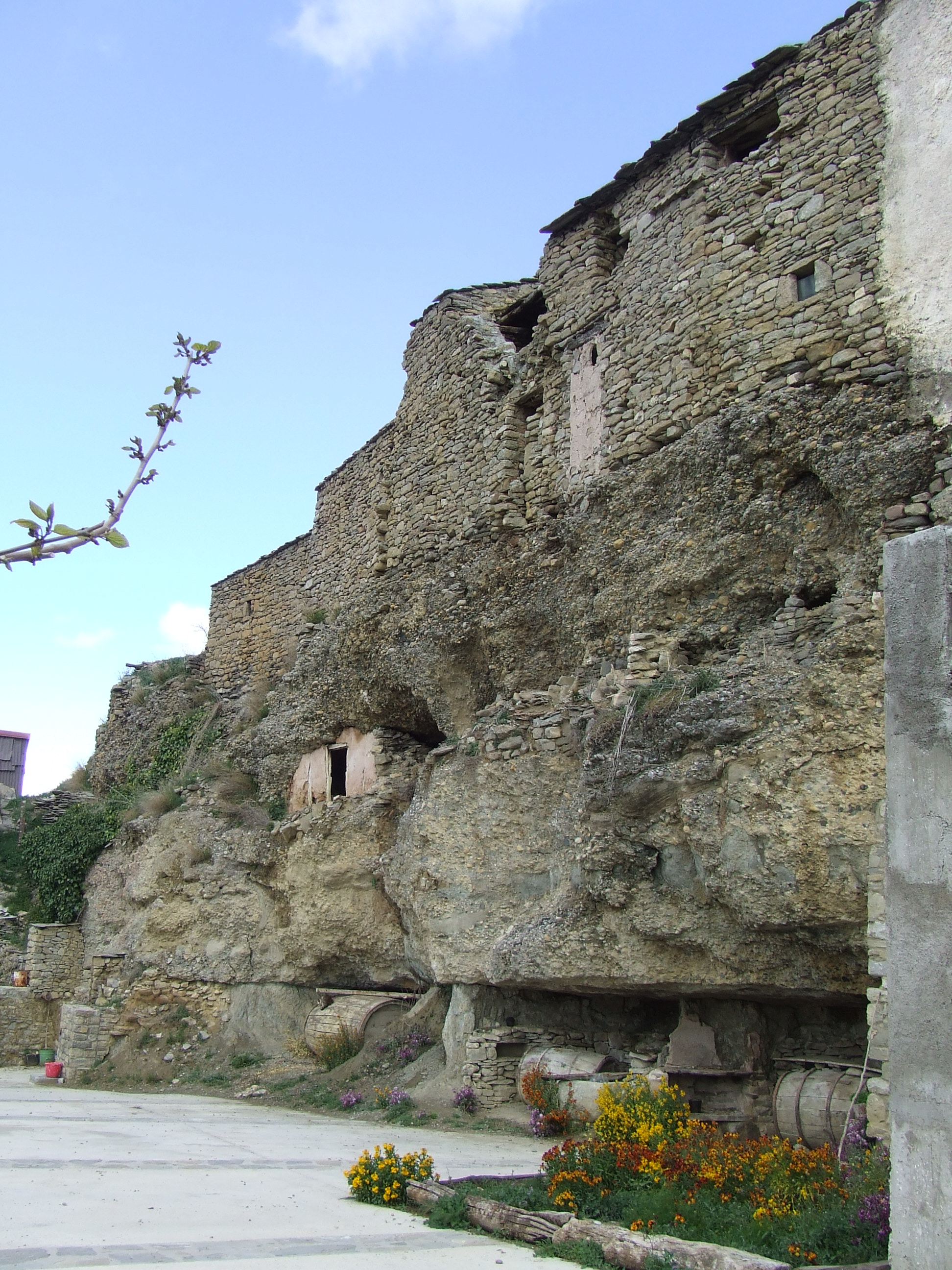 Costat sud del clos del poble de Castellnou de Montsec (Sant Esteve de la Sarga, Pallars Jussà)